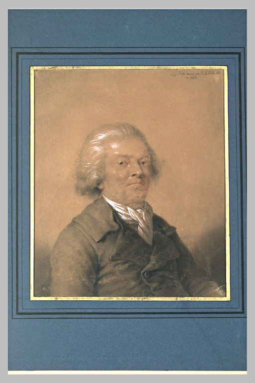 Portrait en buste de Jean Georges Wille INV 33397, Recto, Louvre